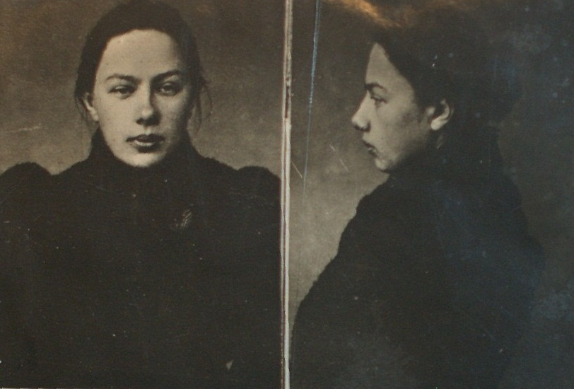 Nadezhda Krupskaja